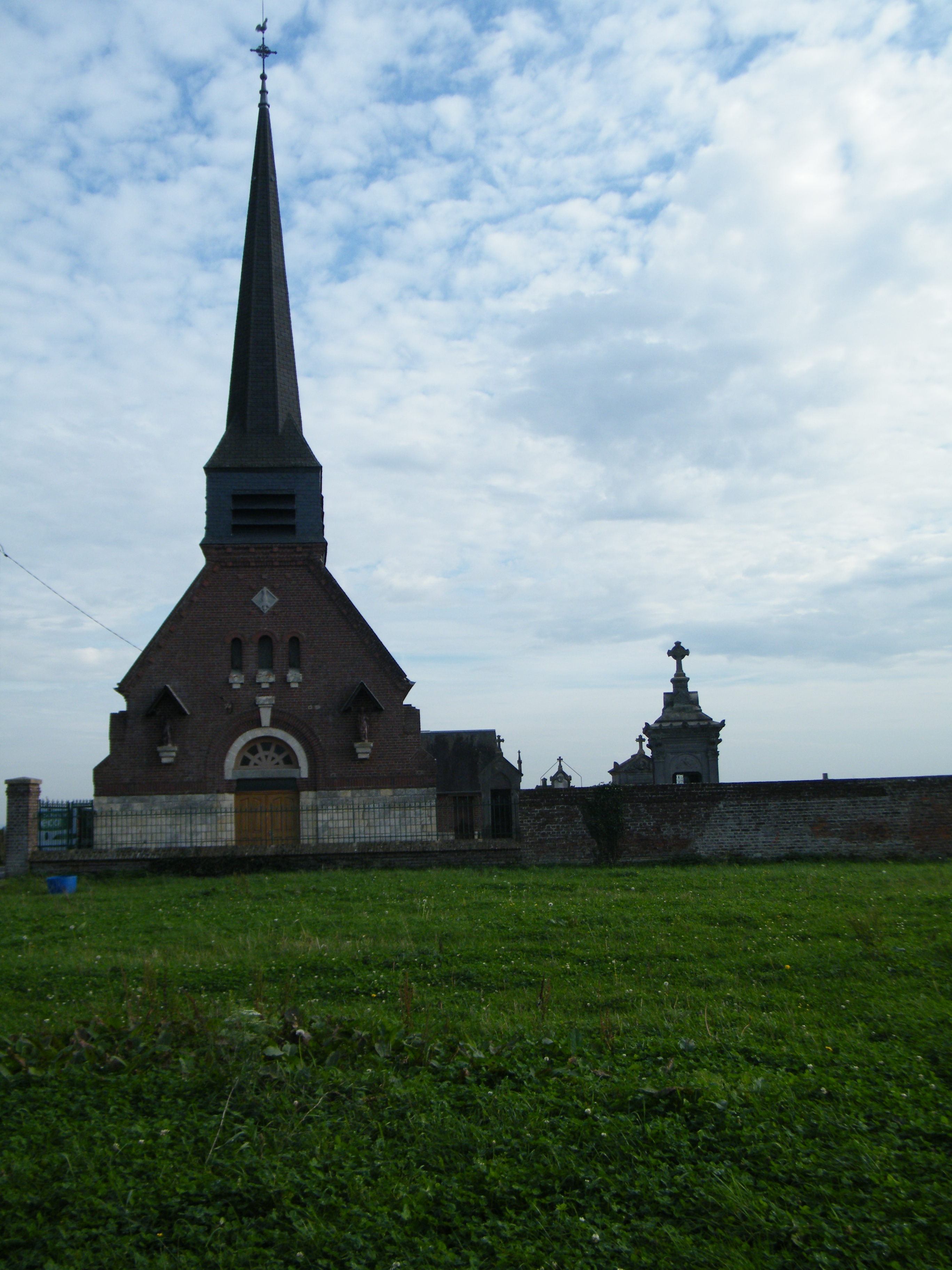 église.